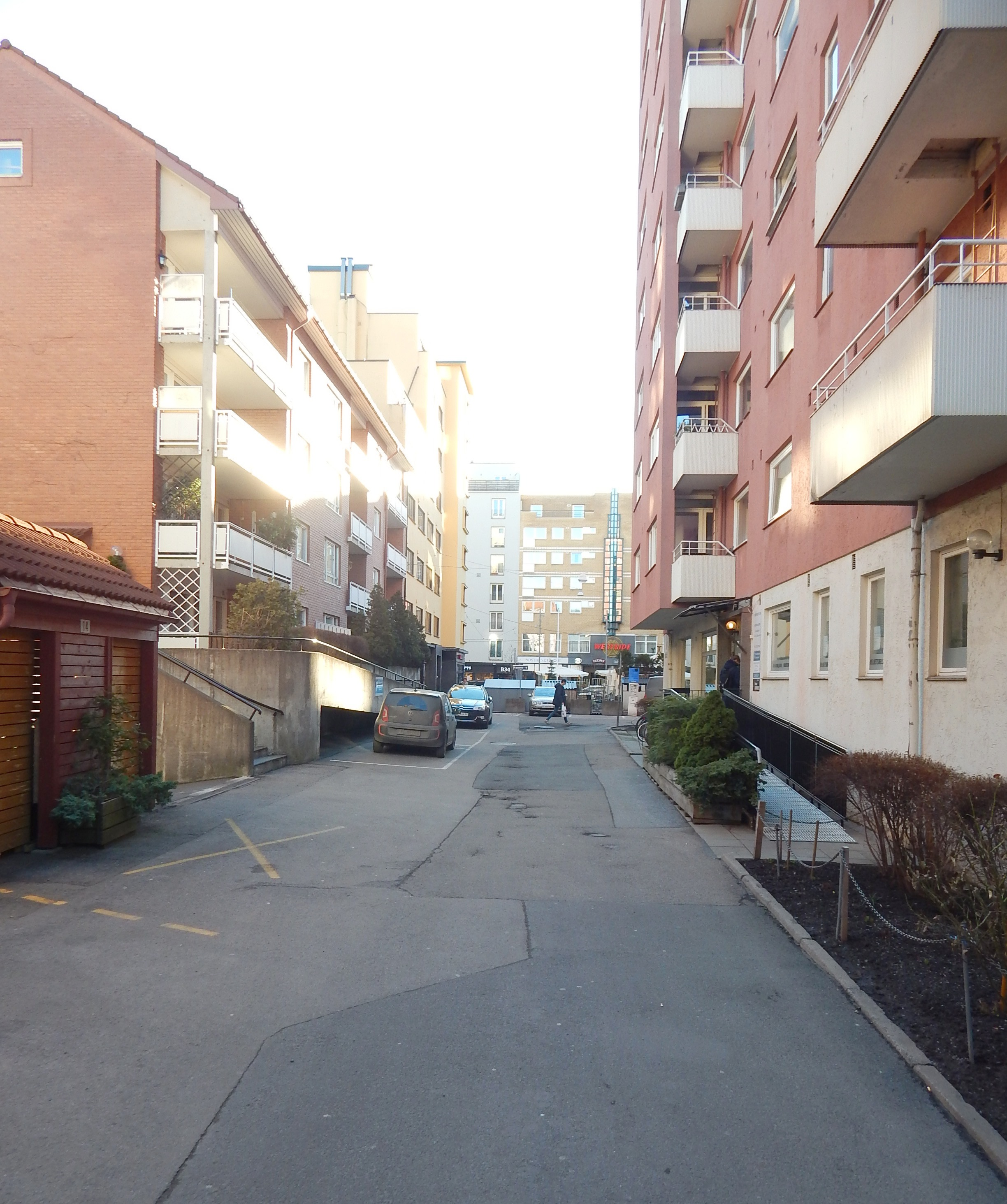 Henrik Wergelands allé i retning Bogstadveien